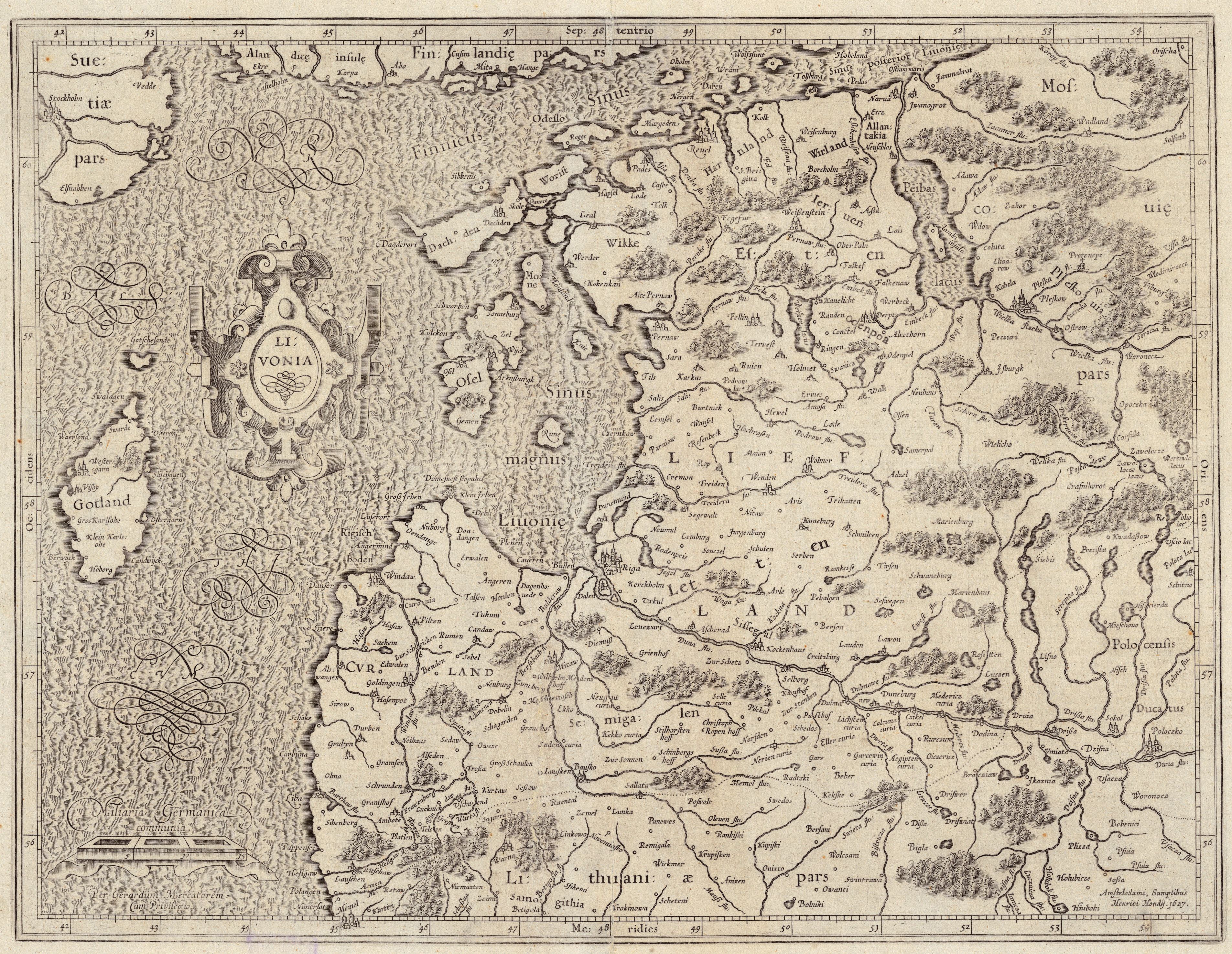 Livonia: Cum privilegio Published in: Gerhardi Mercatoris et J. Hondii. Atlas. Ofte Afbeeldinghe vande gantsche Weerldt in Amsterdam in 1634. Copper engraving, ca 1:1 700 000, 35 x 46 cm.